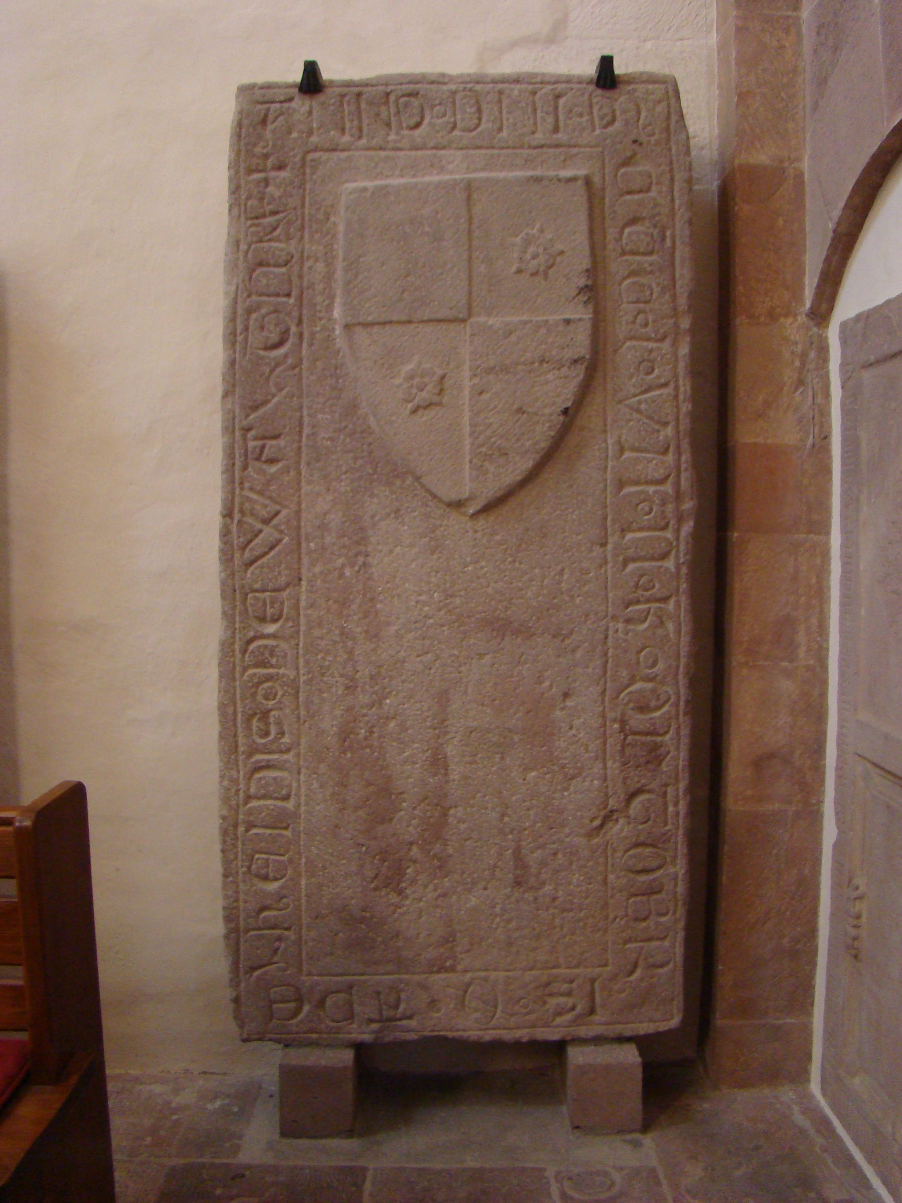 Klosterkirche Lobenfeld, Grabplatte der Adelheid von Waltdorf